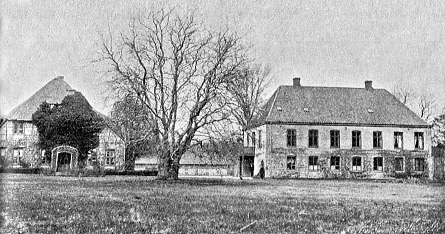 Gyllingnæs ligger i Gylling Sogn, Hads Herred, Odder Kommune. Næsset er udskilt fra Åkær Gods i 1801 af greve Friedrich Otto von Dernath. Gyllingnæs blev købet af den engelskfødte købmand John Smith. Hovedbygningen på Gyllingnæs er opført i 1865.